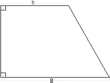 Trapézio retângulo